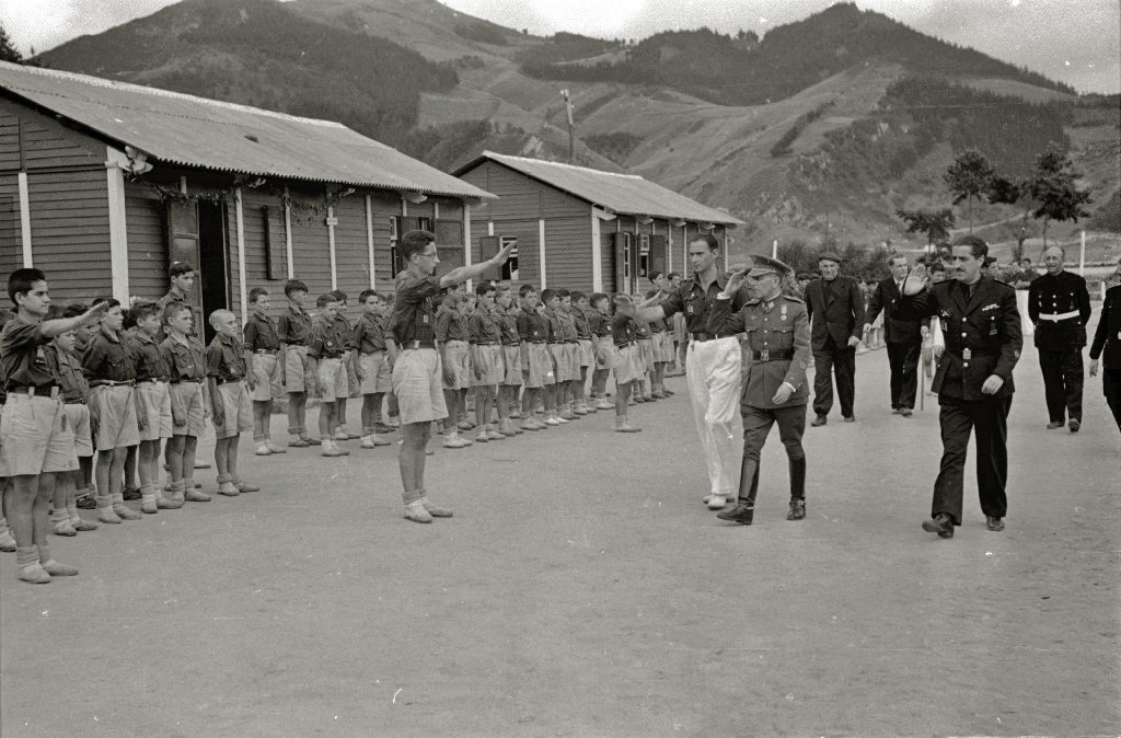 Autoridades militares visitando el Campamento del Frente de Juventudes en Orio, Guipúzcoa.